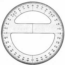 Modelo de transferidor escolar de 360Â° Data: 23/01/2006 Autor: A.G. Freitas Neto Fonte: Arquivo particular